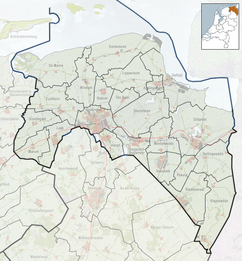 Referentiekaart van Provincie Groningen, met indeling van gemeenten (2010) en impressie van het landschap. Door Jan-Willem van Aalst, samengesteld uit publiek beschikbare geo-data: Referentie-ondergrond (kustlijn, steden, wegen) gerasterd uit de OpenStreet Map OSM. ( Inhoud is beschikbaar onder de Creative Commons Attribution-ShareAlike 3.0 license. Referentie-ondergrond op water bewerkt vanuit Gebruik is vrij met bronvermelding NLR en ESA. Vectorgrenzen van gemeenten en regio's vrij ter beschikking gesteld met dank aan cartografen van brandweerregio's Hollands-Midden en IJsselland; gerasterd in Photoshop. Hoogte-aanduidingen (reliëf) gerasterd uit de AHN Viewer ( gebruik is vrij met bronvermelding (c) AHN, Overige kenmerken op de kaart: eigen tekenwerk van Jan-Willem van Aalst, op basis van gerasterde gemeentegrenzen.